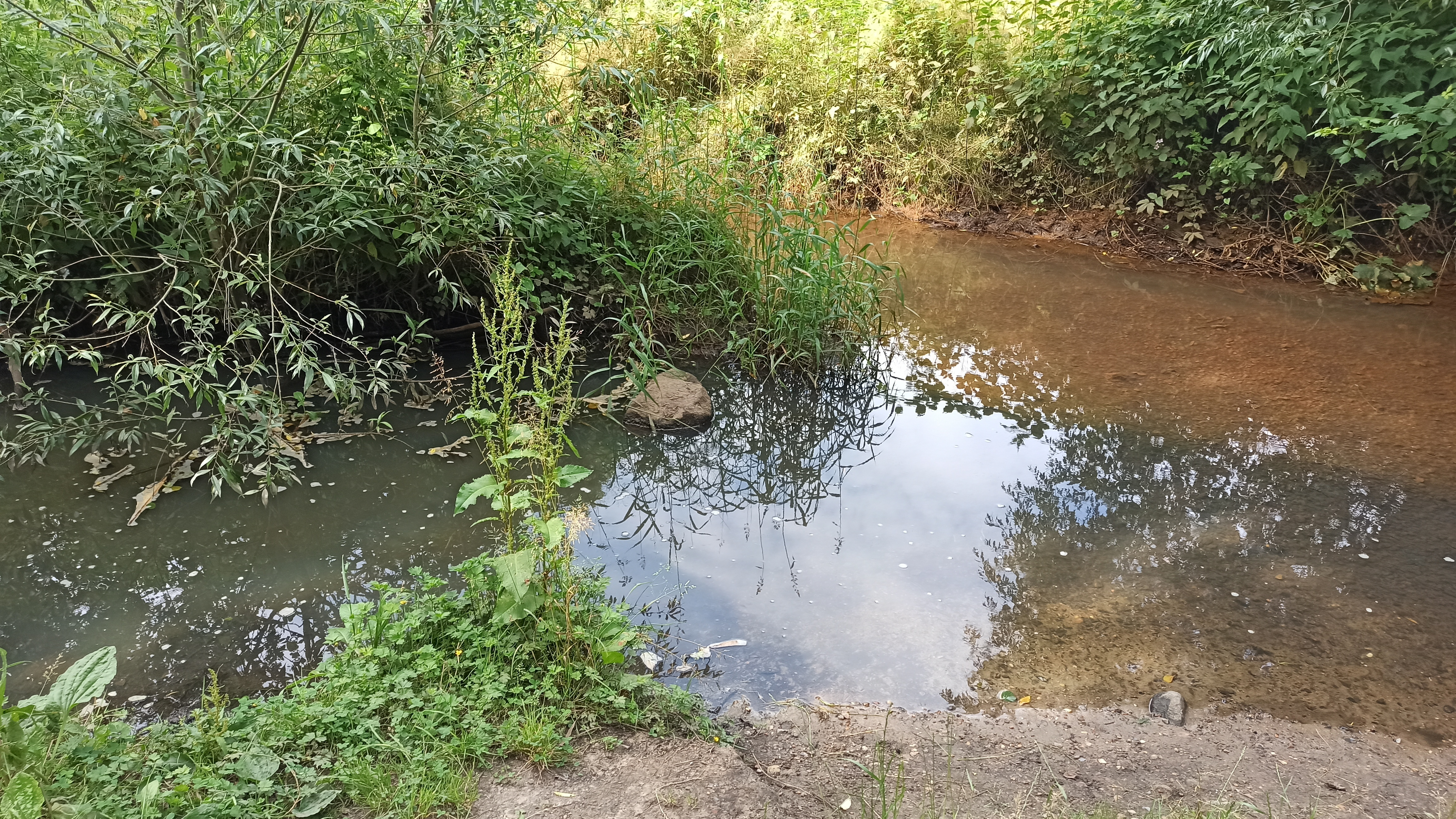 Mündung der Mühlenau in die Kollau